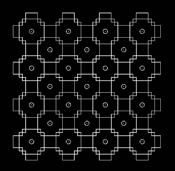 Drawn by mayooranathan